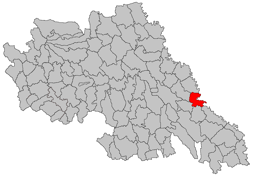 Categorie:Hărţi ale judeţului Iaşi